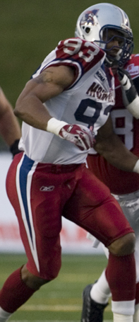 Joffrey Reynolds